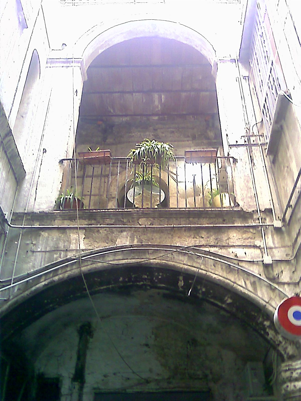 Palazzo in via Nilo 22: Loggia and arch